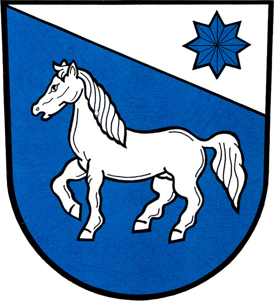 Znak obce Mezina